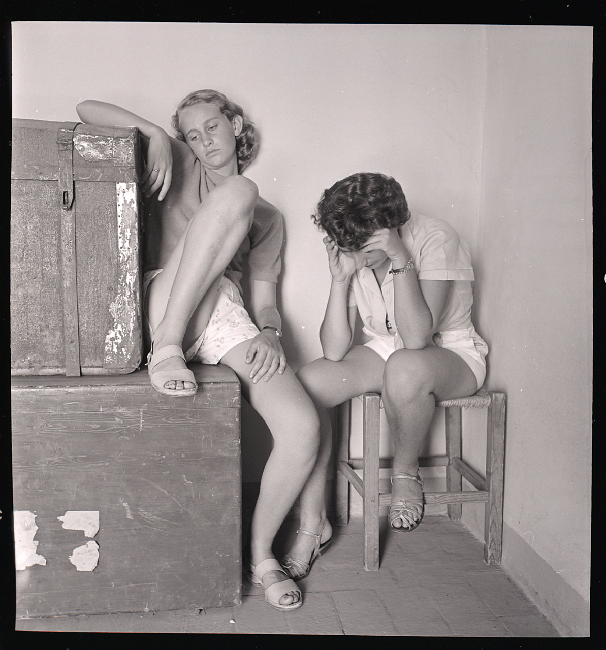 Serie fotografica : Venezia, 1953 / Paolo Monti. - Buste: 4, Fototipi: 4 : Negativo b/n, gelatina bromuro d'argento/ pellicola ; 6x6. - ((Serie costituita da 4 buste di negativi identificati con i nn.: 5287, 5288, 5289, 5290, e tenute insieme da una graffetta. - Sulla busta identificata con il n. 5287 iscrizione didascalica manoscritta a pennarello: "Meme e/ Graziella". - La suddetta serie è contenuta nella scatola R5161-5318 e identificata con l'iscrizione didascalica manoscritta a pennarello nero: "Meme". - La ragazzina ritratta è la nipote di Paolo Monti, Maria Elvira Coquio, detta Meme; figlia del cognato e amico Carlo Cocquio e sorella di Seconduccio (detto Duccio).